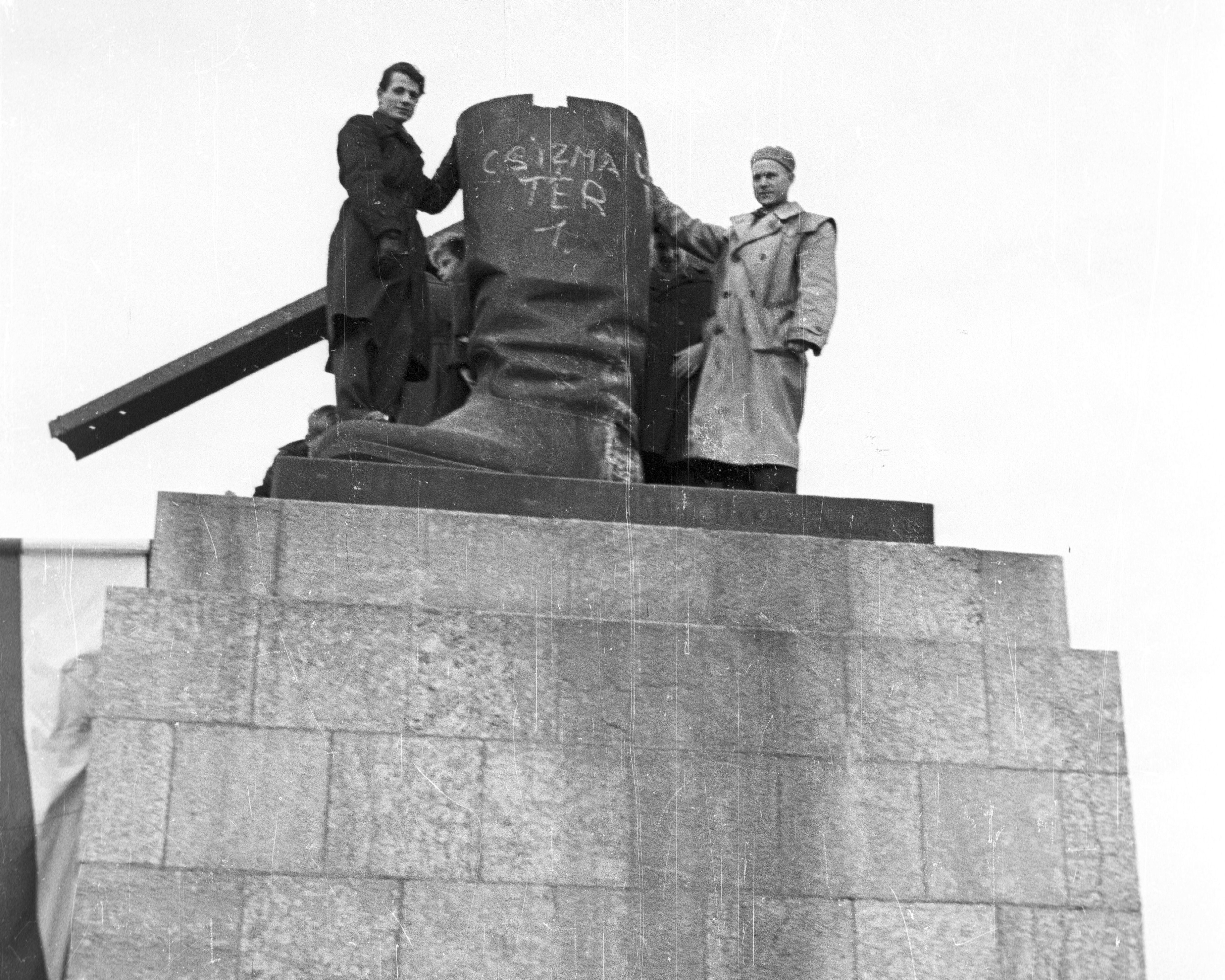 Ötvenhatosok tere (Sztálin tér), a Sztálin szobor maradványa.